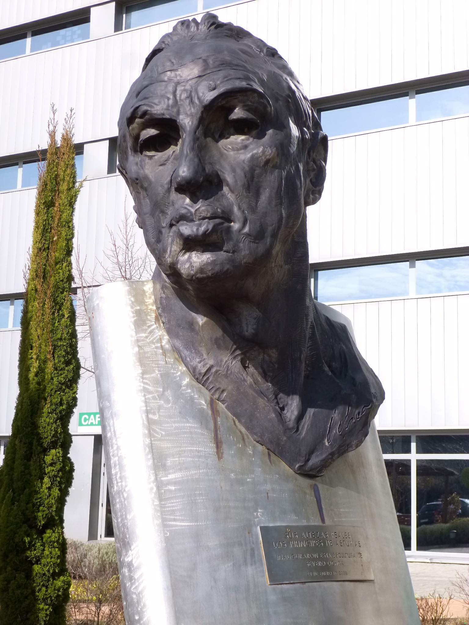 Madrid - Centro de Biología Molecular (CBM) Severo Ochoa